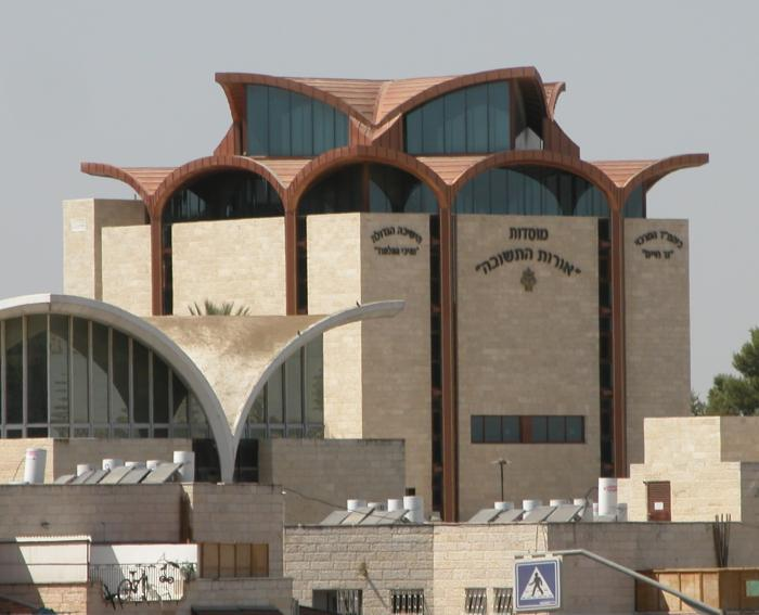 בית מדרש "אורות התשובה" בהר נוף